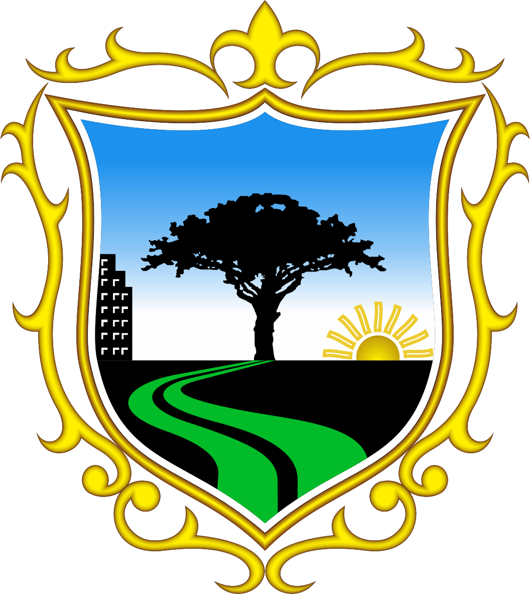 Distrito de San Borja - Provincia de Lima - Región Lima